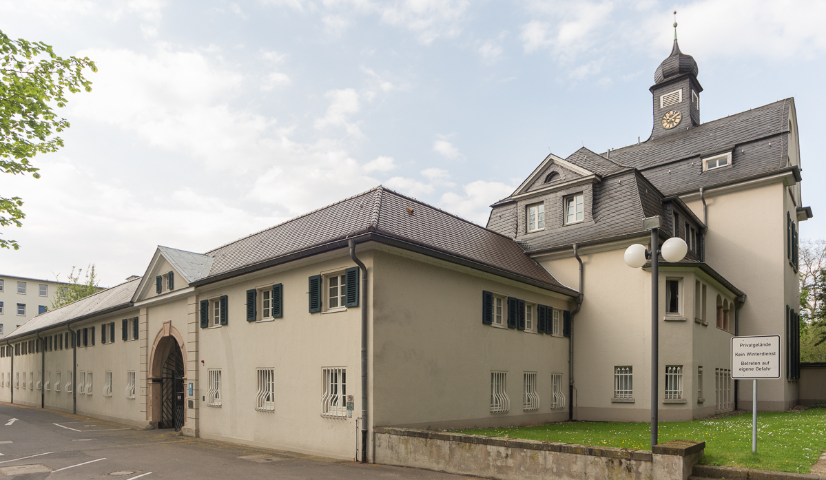 Schloss Deichmannsaue, Bonn, Deutschland